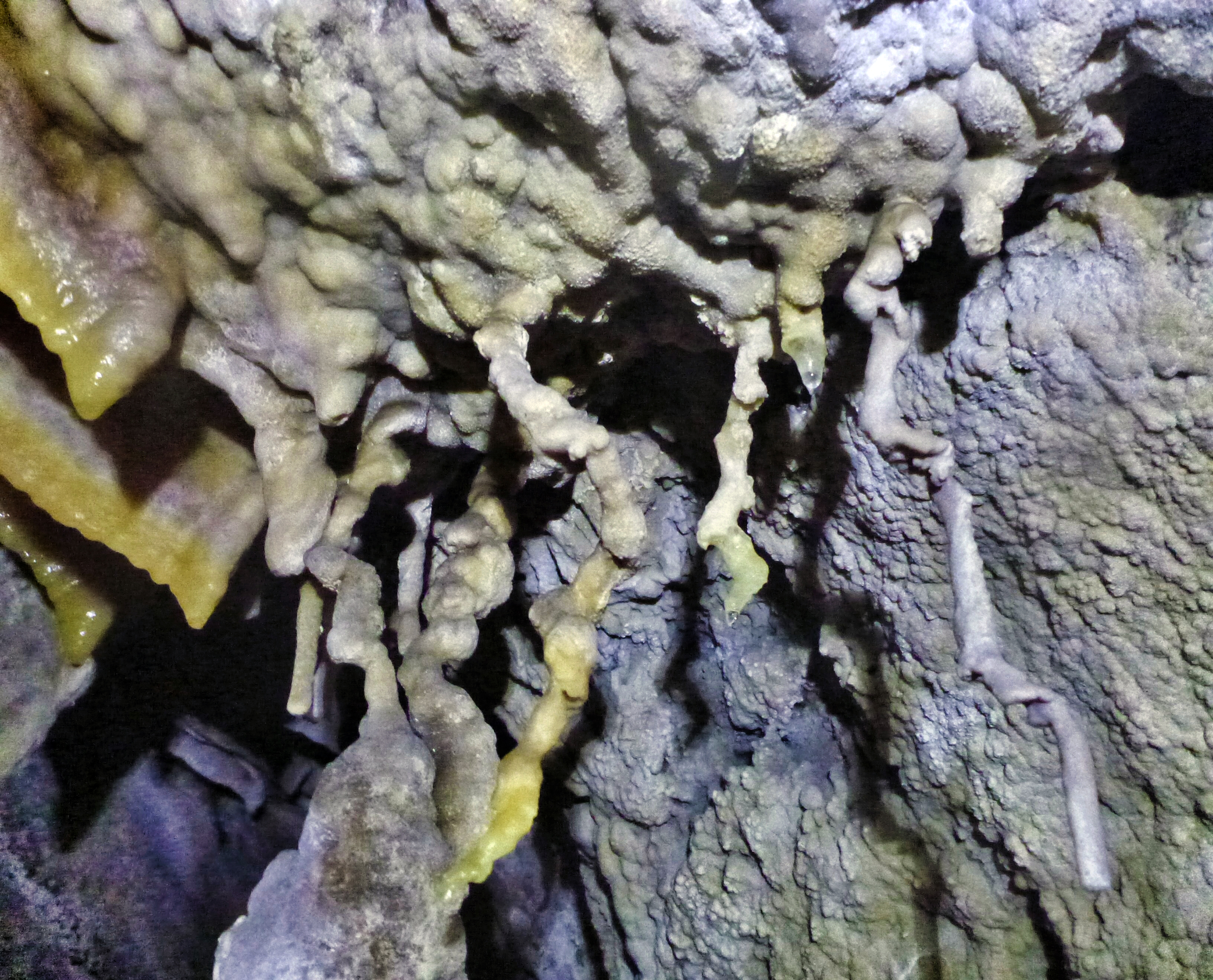 eccentriche grotta dei sette nani